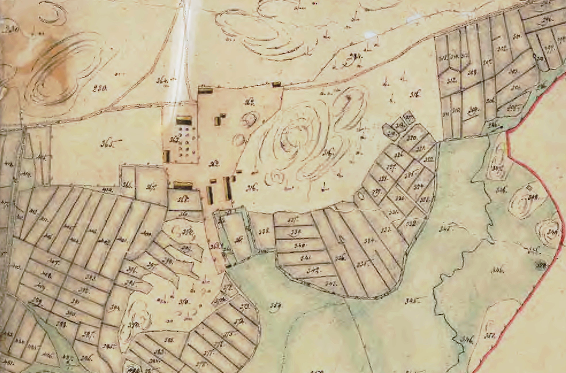 Del av karta över laga skifte 1849 visande Ekebys huvudbebyggelse